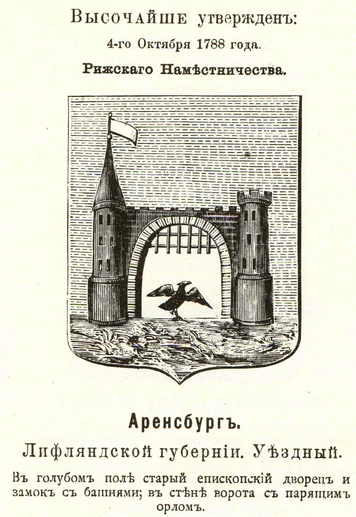 Official Russian Empire coat of arms Arensburg. Герб Российской Империи уездного города Аренсбург Лифляндской губернии (в 1788 - Рижского наместничества) с официальным описанием в Гербовнике Винклера.